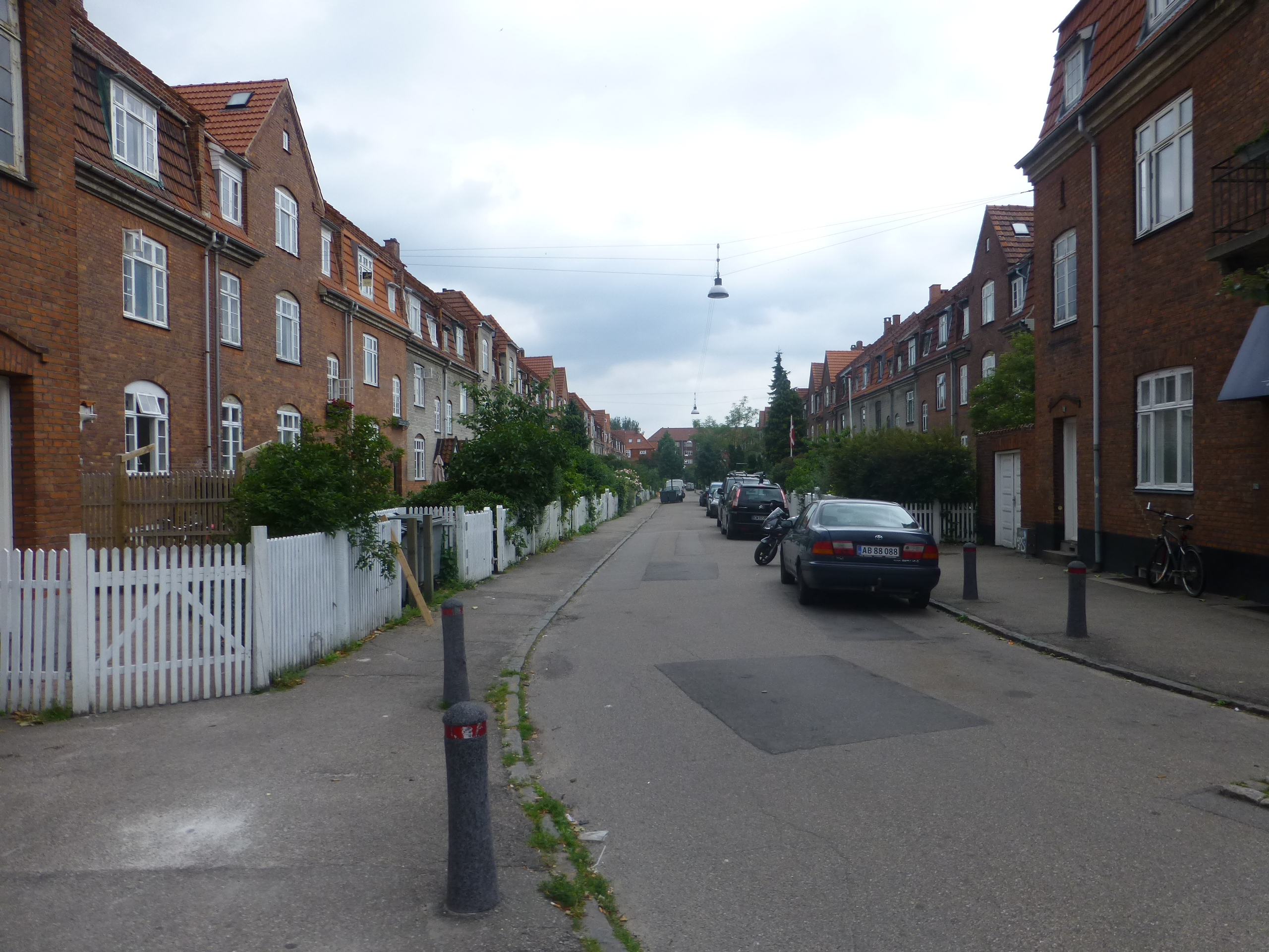 The street Rudolph Berghs Gade in Østerbro in Copenhagen.